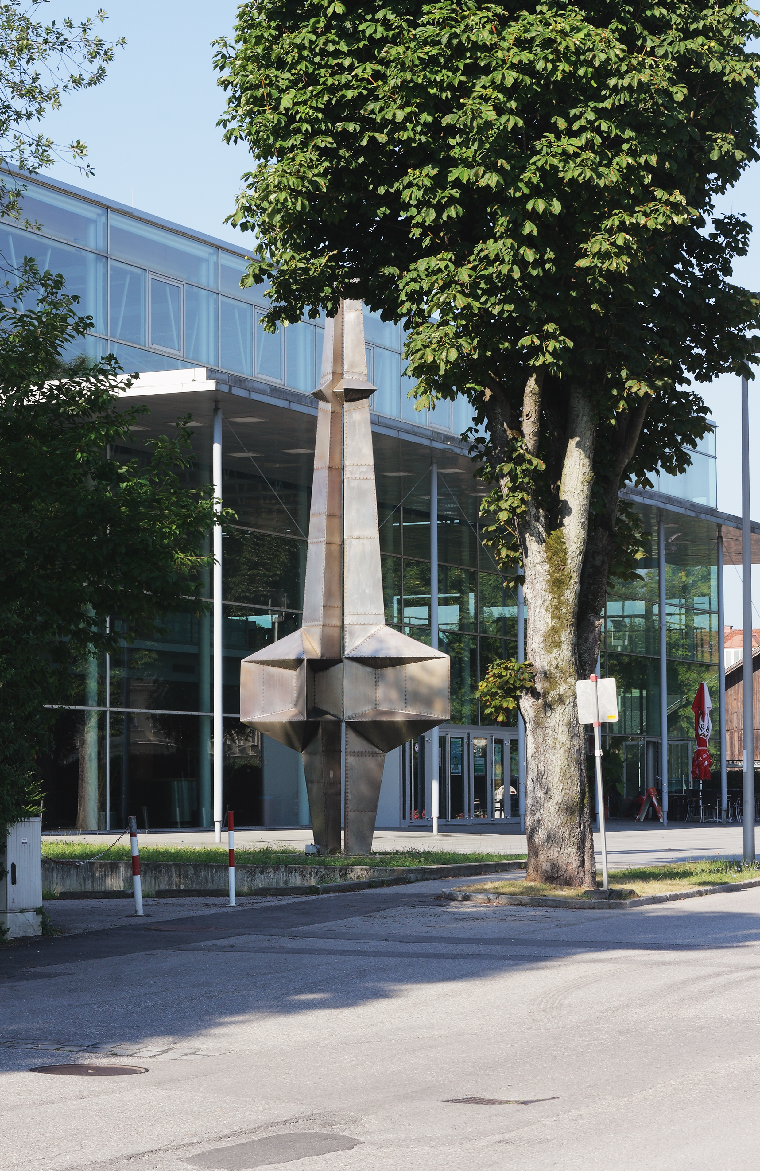 Die Metallplastik Schwert des Geistes von 1970 vor der Steyrer Stadthalle am Tabor. Künstler ist Josef Priemetshofer